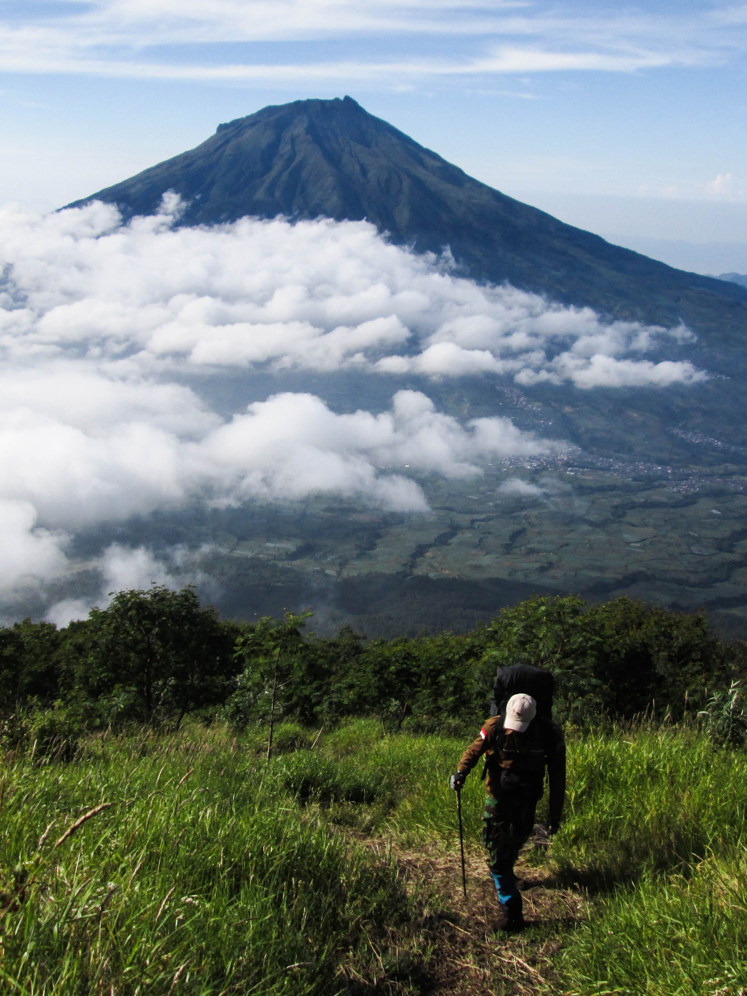 pendaki sedang menapaki jalur rerumputan menuju Pos 4 gunung Sindoro dengan latar belakang gunung Sumbing